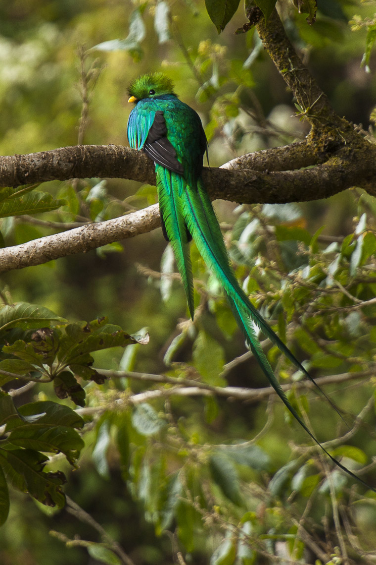 Resplendent Quetzal - Panama_H8O1573